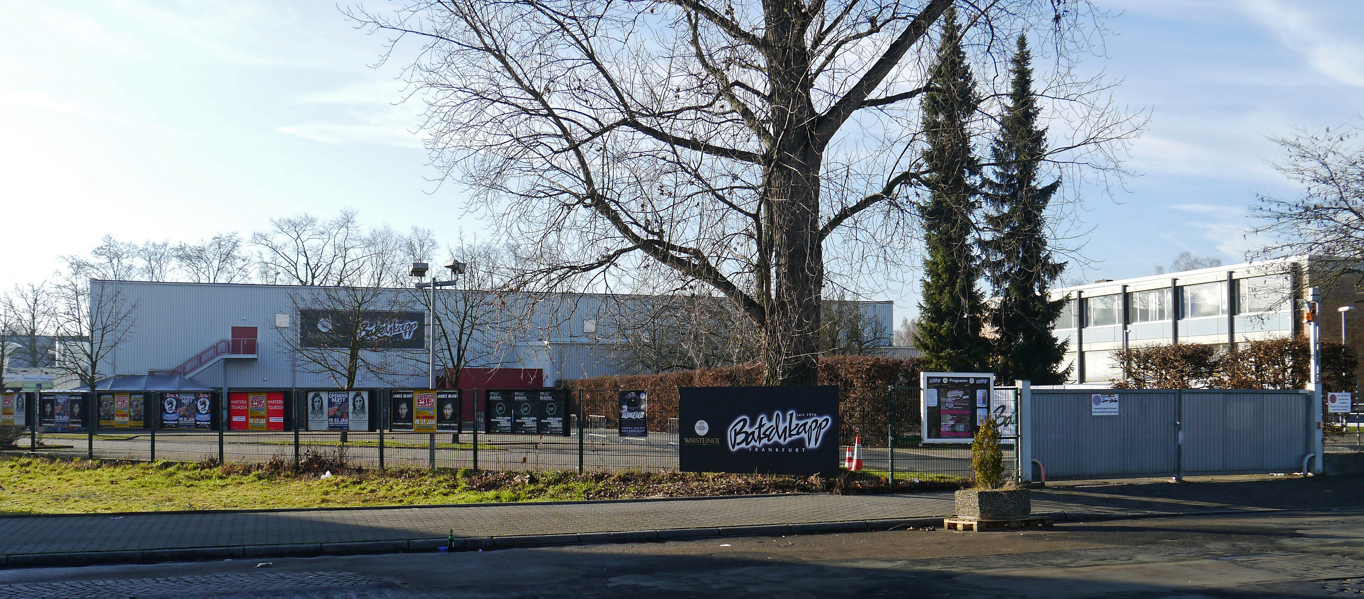 Die Batschkapp, 2014 an ihrem neuen Standort in Ffm-Seckbach, Gwinnerstrasse 5.